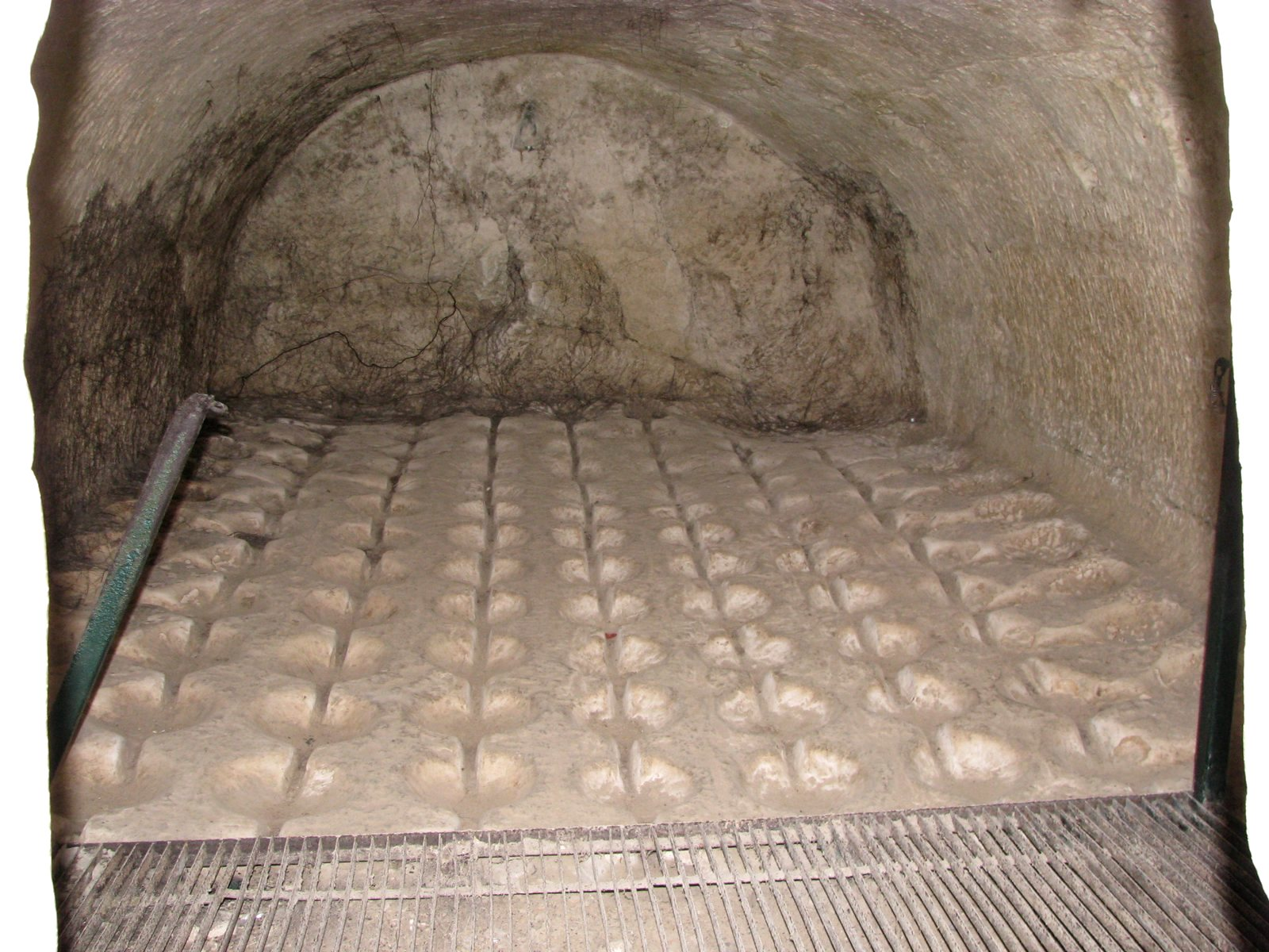 מערות חזן הוא שמה של מערכת מסתור בישראל מתקופת מרד בר כוכבא, הממוקמת מדרום למושב אמציה. היא מורכבת ממערות קארסטיות, חללים חצובים, מתקנים חקלאיים ובורות מים המקושרים זה לזה במנהרות ומחילות תת-קרקעיות. בתמונה חדר תת קרקעי לאחסון נוזל (אולי שמן או יין) בכדים. ברצפה שקעים לבסיס הכדים ולתעלות האיסוף למקרה שהכד נשבר..